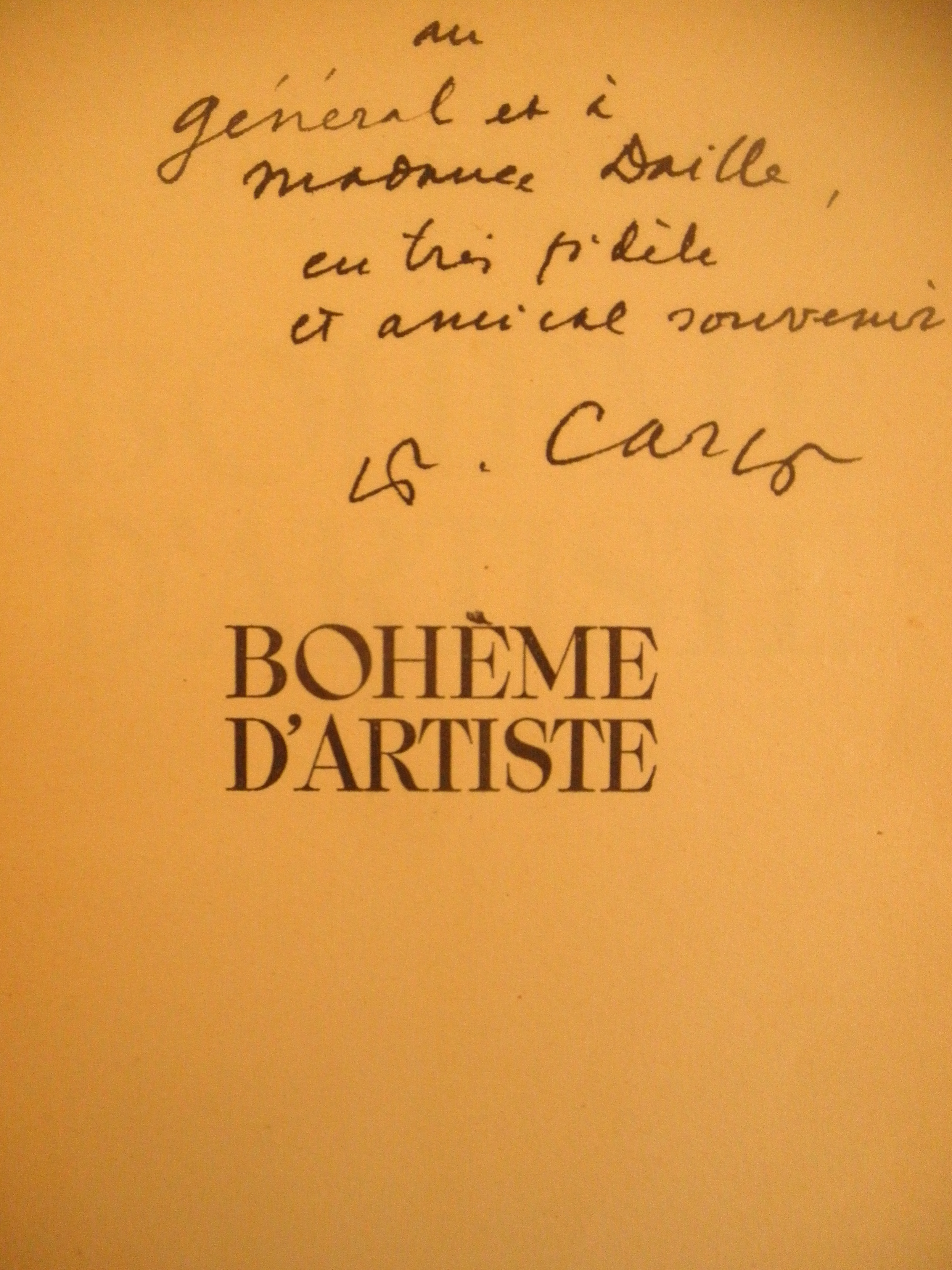 Manuscrit littéraire 1918